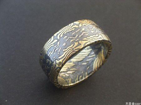 Mokume Ring des Goldschmiedemeisters Markus Eckardt; Erlaubnis liegt vor